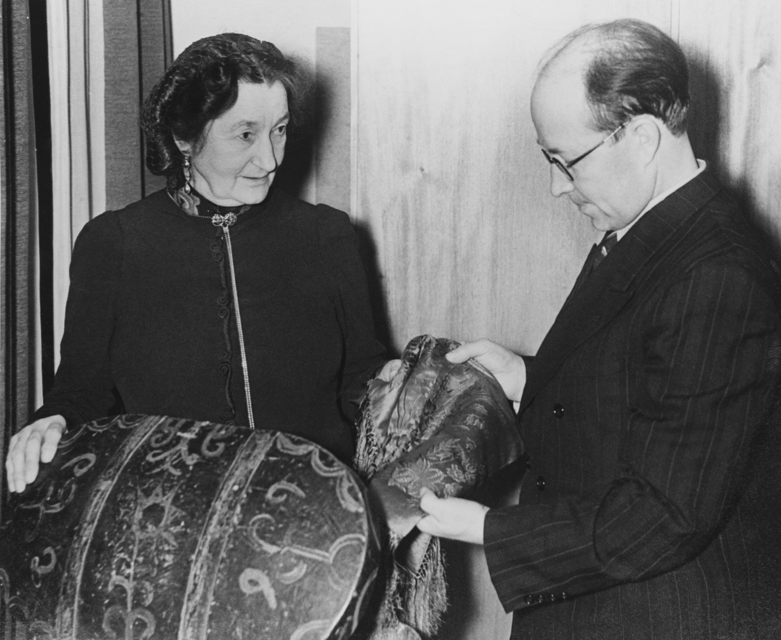 Professorskan Emilie Demant Hatt överlämnar en samling föremål som tillhört Johan Turi som gåva till Nordiska museet i samband med museets Lapplandsafton 4 december 1940. Nordiska museets arkiv NMA.0073098